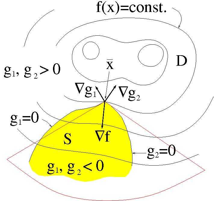 Nicht lineares Minimierungsproblem mit Nebenbedingungen